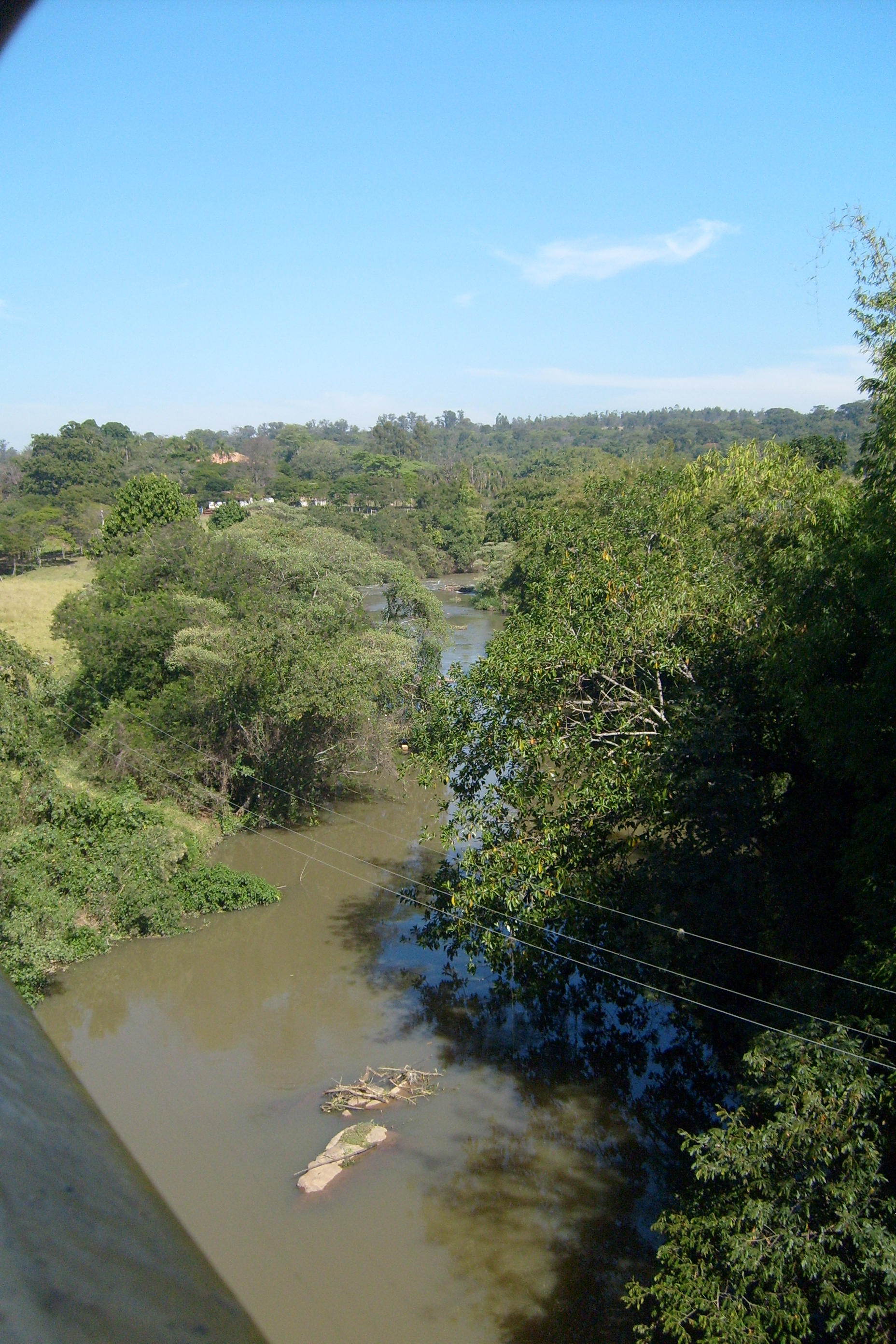 Jaguari River, in Jaguariúna, São Paulo, Brazil.